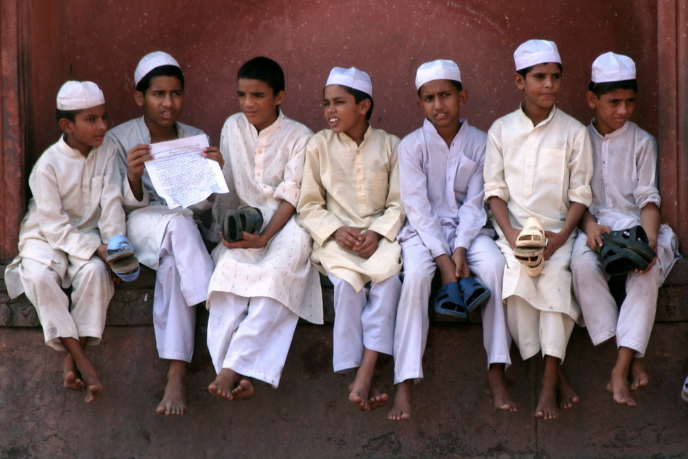 一些穆斯林男孩在印度賈瑪清真寺上午的禮拜結束後反思。.